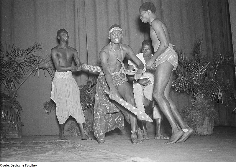 Original image description from the Deutsche Fotothek Auftritt eines afrikanischen Ensembles unter der Leitung der Dichters Fodéba Keïta in der Kongresshalle